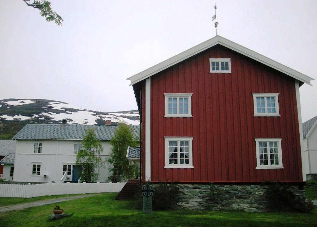 Oppdal prestegård, Sør-Trøndelag